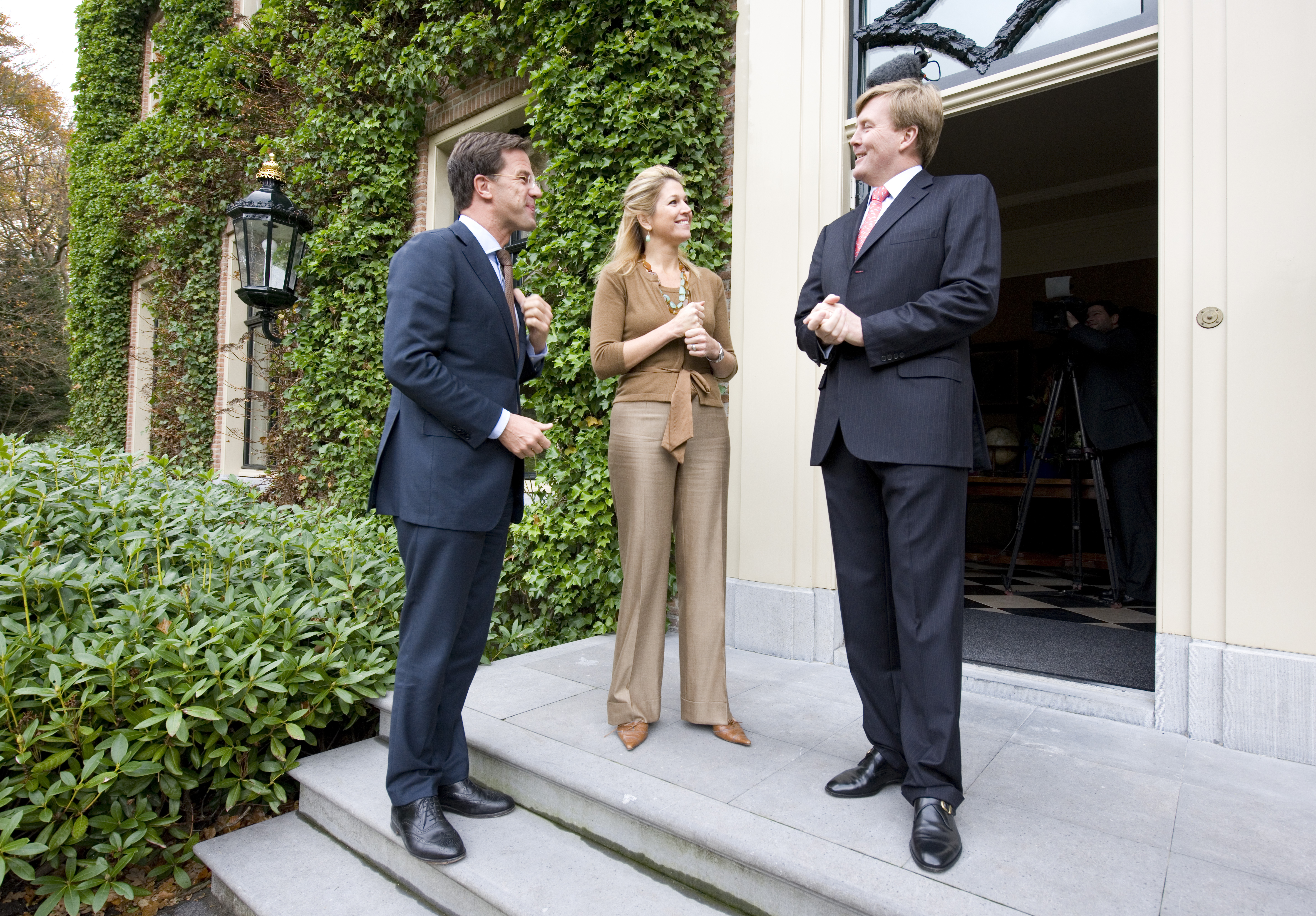 Prins van Oranje en Prinses Máxima ontvangen minister-president Rutte op de Eikenhorst voor een kennismaking.